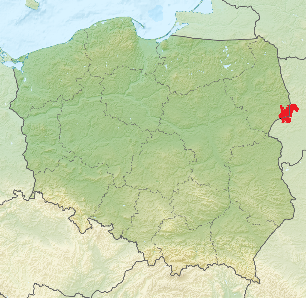 Przybliżony zasięg zwartych drzewostanów Puszczy Białowieskiej na pograniczu Polski i Białorusi (Range of Białowieża Forest). Na podstawie: Marcin Kozieł. Ochrona walorów przyrodniczo-krajobrazowych na pograniczu polsko-białoruskim na przykładzie Puszczy Białowieskiej. „Problemy Ekologii Krajobrazu”. T. XXVI, s. 271-284. 2010, oraz map obszaru Natura 2000 "Puszcza Białowieska" (PLC200004).